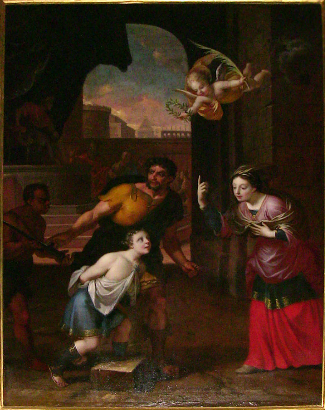 Le martyre de Saint Symphorien Daniel Hallé 1671